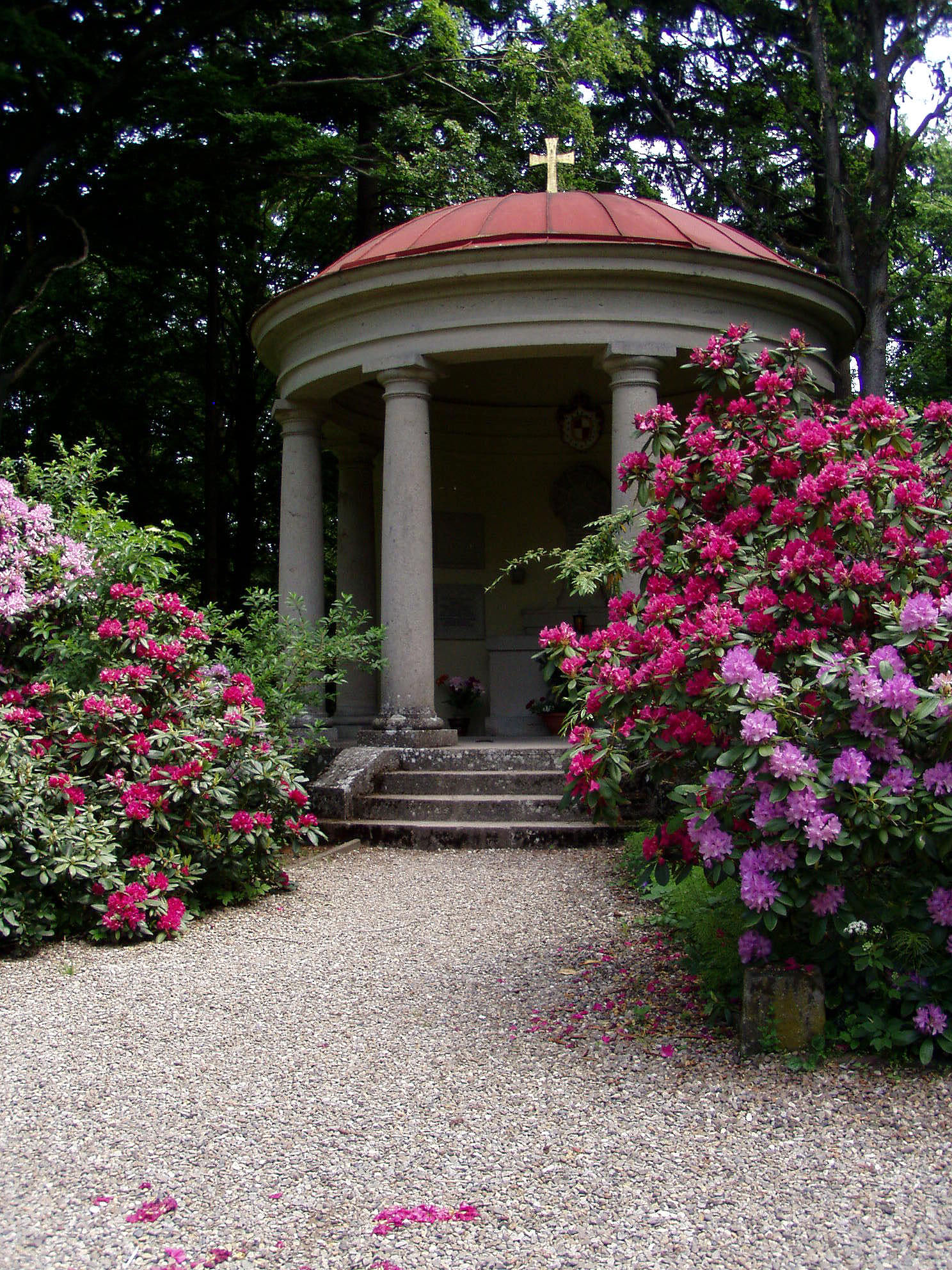 Mausoleum der Herren vom Schwanberg, Schwanbergpark